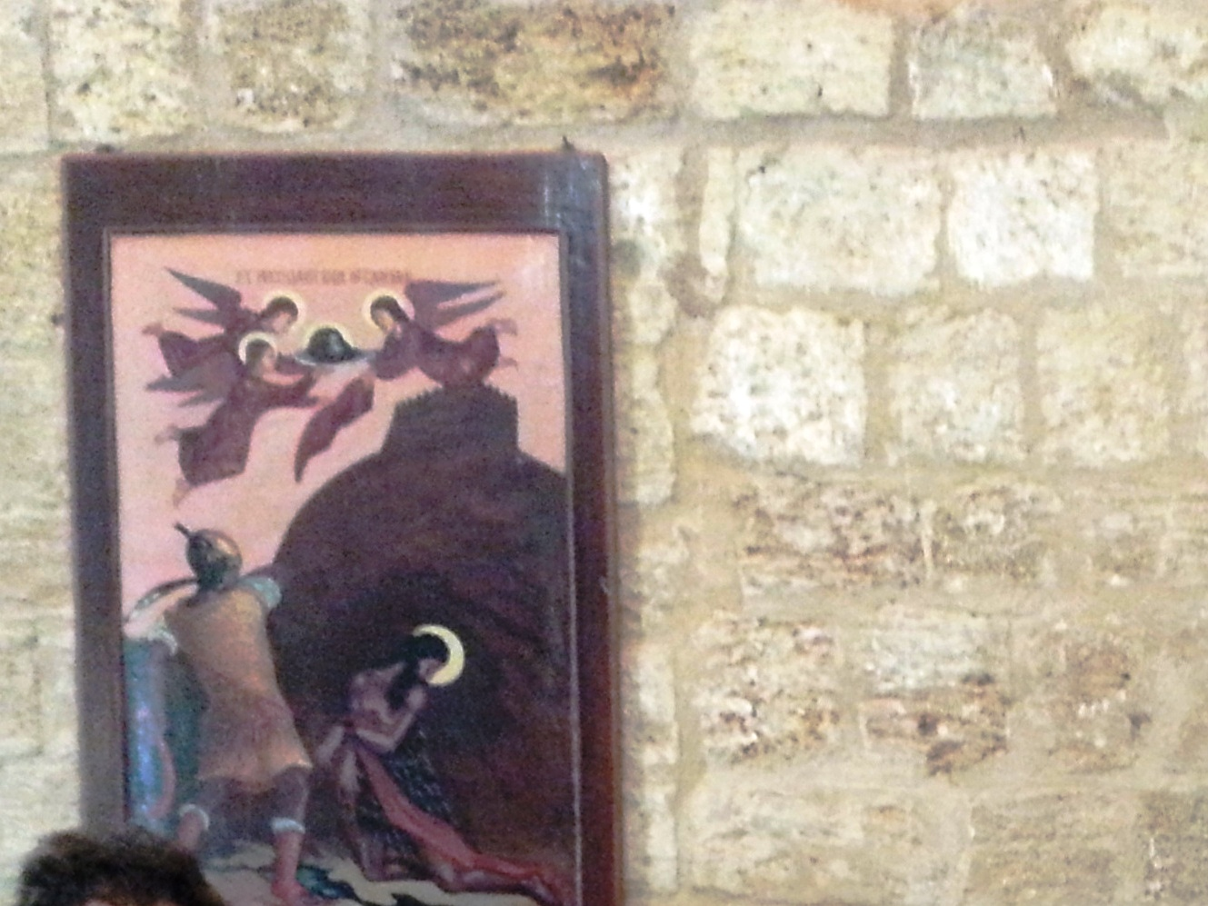 Franziskanerkirche St. Johannis Baptistae in Akko, Israel, Ikone, die Enthauptung Johannis des Täufers darstellend (teils abgeschnitten)